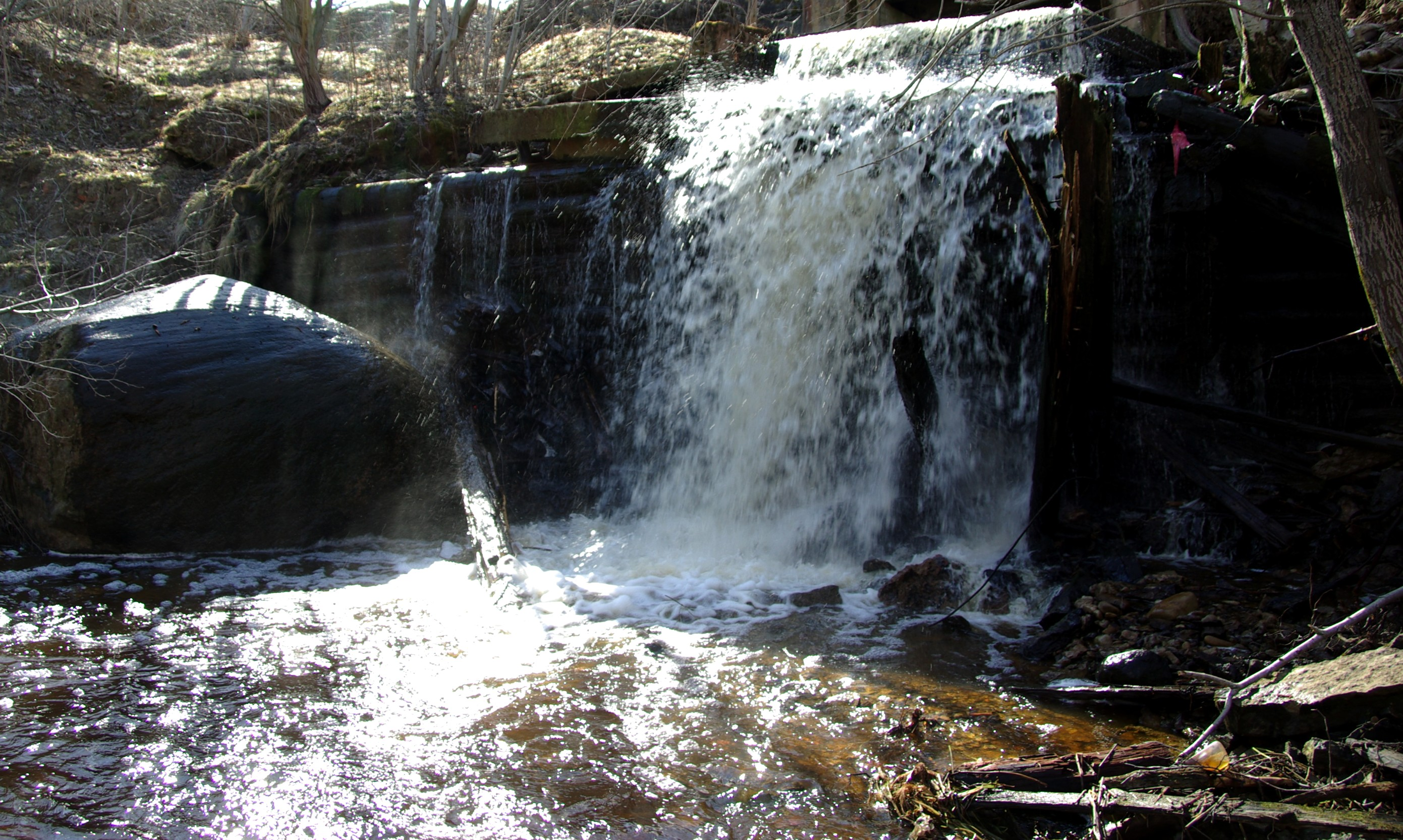 Aseri juga paikneb Aseri aleviku territooriumil.